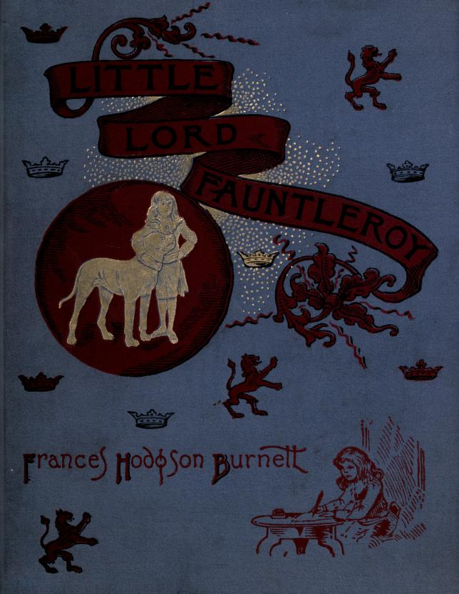 Couverture de Little Lord Fauntleroy de Frances Hodgson Burnett, New-York, Charles Scribner's sons, 1886 [1]